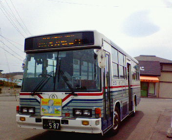 八戸市営バス一般路線塗色（いすゞ・ジャーニーK：KC-LR333F・自主発注車）：ワンコインバス・うみねこ号運用 種差海岸駅前にて